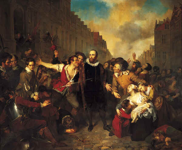 Gustaaf Wappers Antwerpen 1803 - Parijs 1874